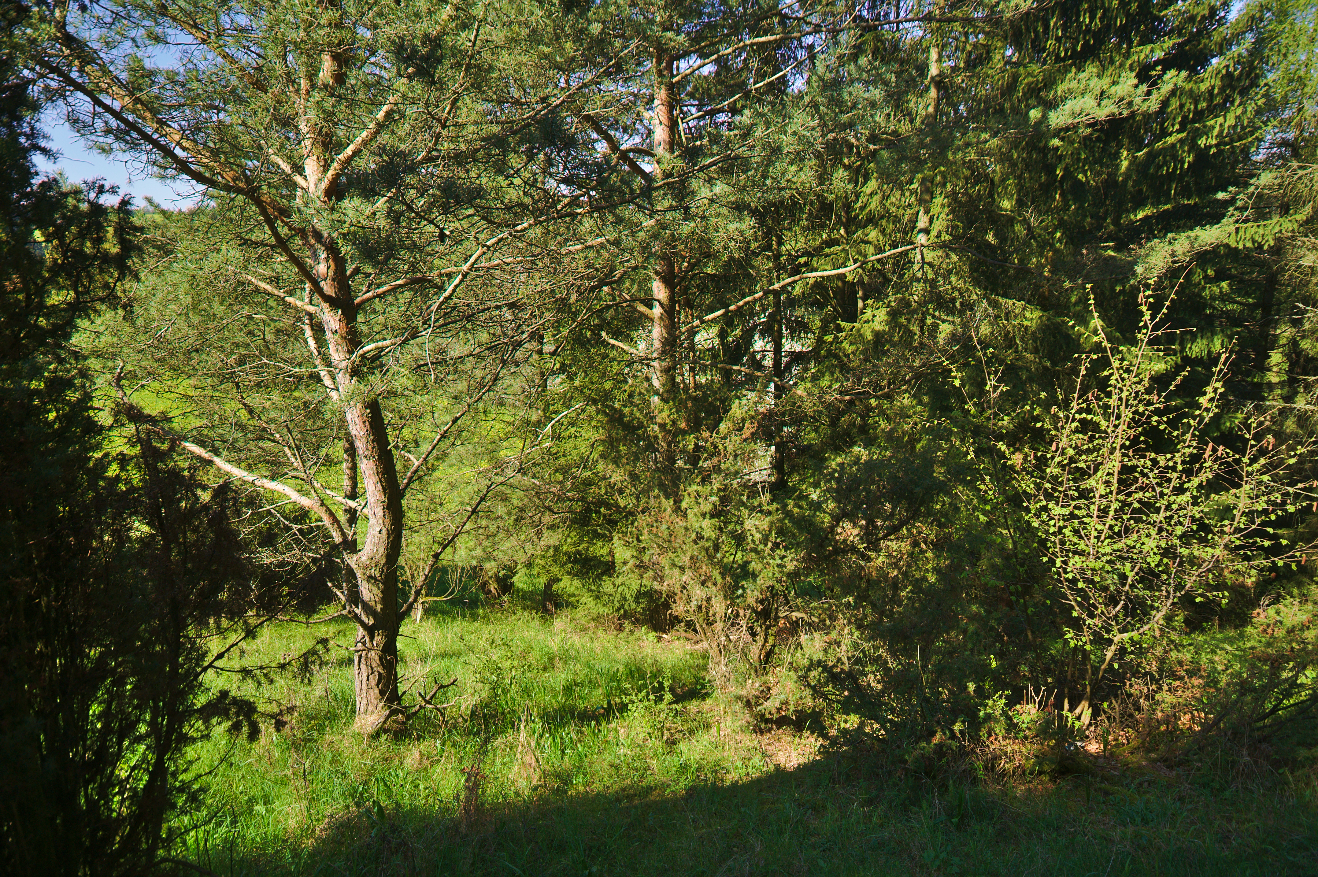 Přírodní památka Lhotské jalovce a stěny, okres Blansko